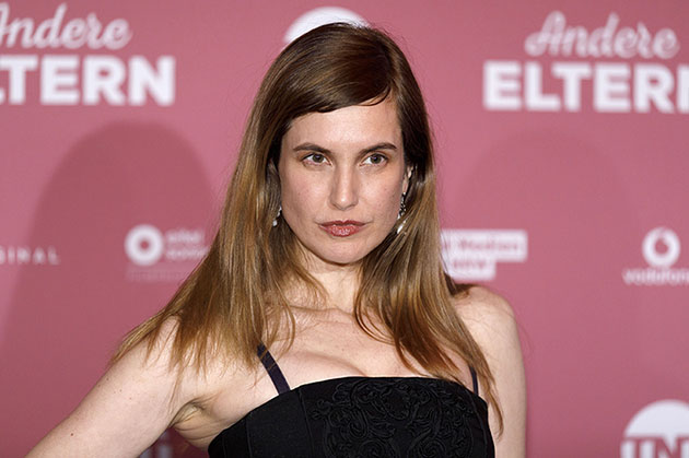 Mirijam Verena Jeremic bei der Premiere der TNT Comedy-Serie 'Andere Eltern' in Köln 2019